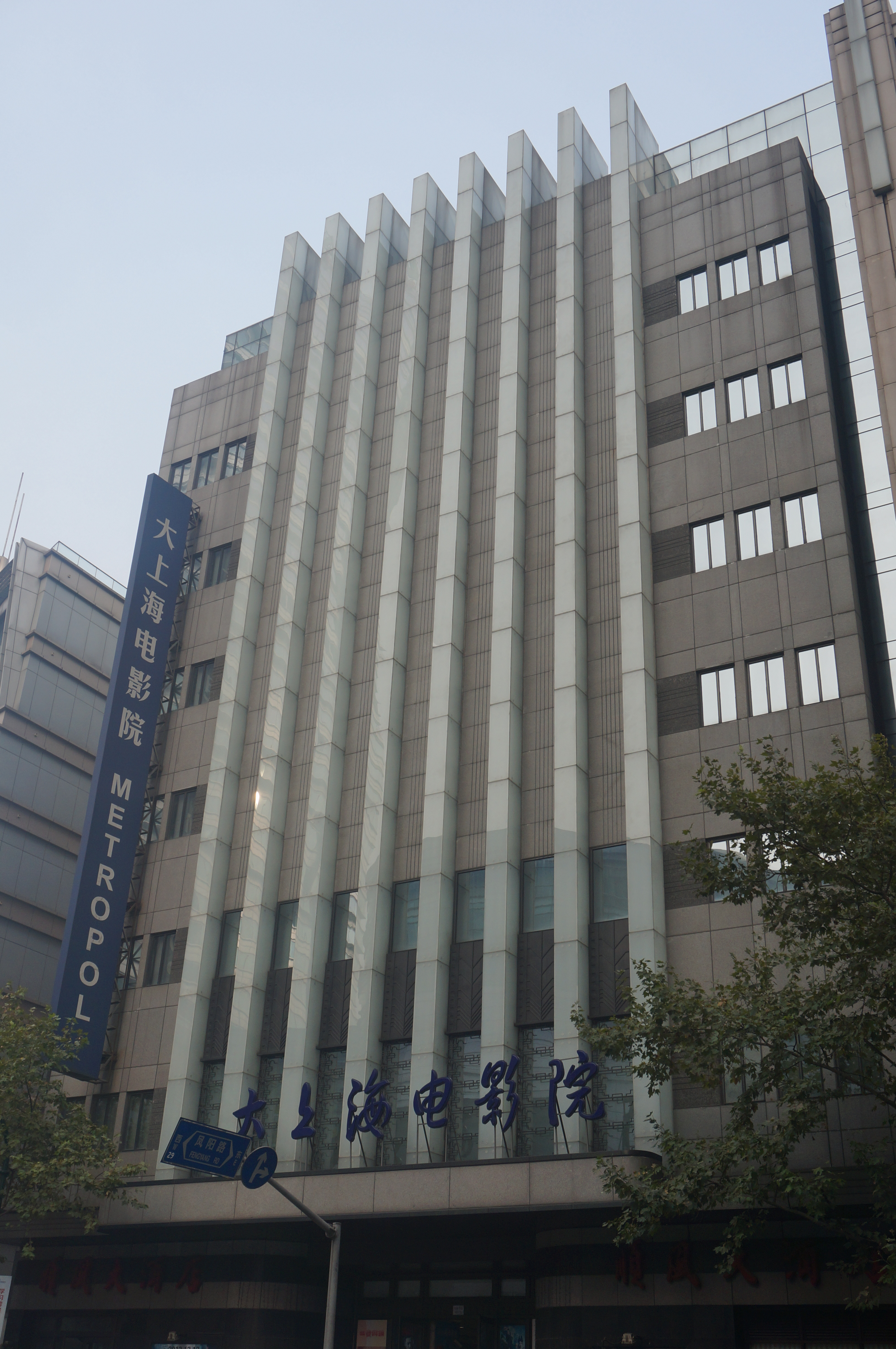 大上海电影院